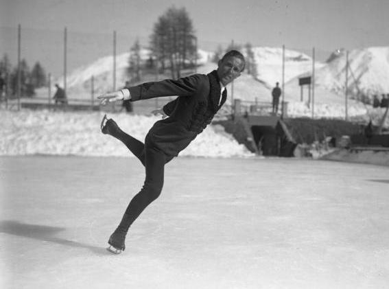 Der Weltmeister im Eiskunstlauf Gillis Grafström verteidigt seinen Titel auf der Winter-Olympiade in Lake Placid! Gillis Grafström, der größte Künstler des Schlittschuhs unserer Zeiten wird vor der Olympiade nochmal in Berlin starten.